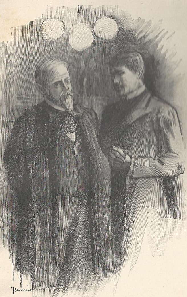 Illustration de Georges Jeanniot (1848-1934) pour "Le Calvaire", roman d'Octave Mirbeay (1848-1917). Éditions Ollendorff, 1901.